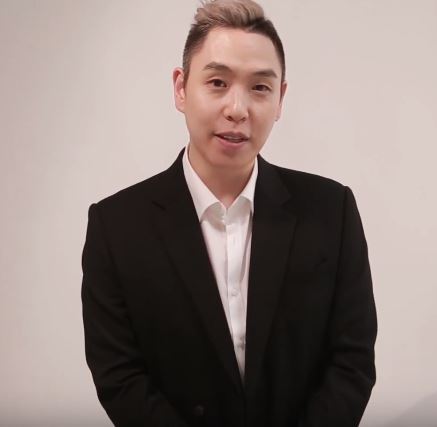 씬플 5월호는 일루셔니스트 이은결과 함께했습니다! 5월 17일부터 시작되는 'THE ILLUSION' 공연을 준비하고 있는 그의 이야기를 들어보았는데요. 씬플 독자 여러분을 위해 인사를 남겨주었어요!